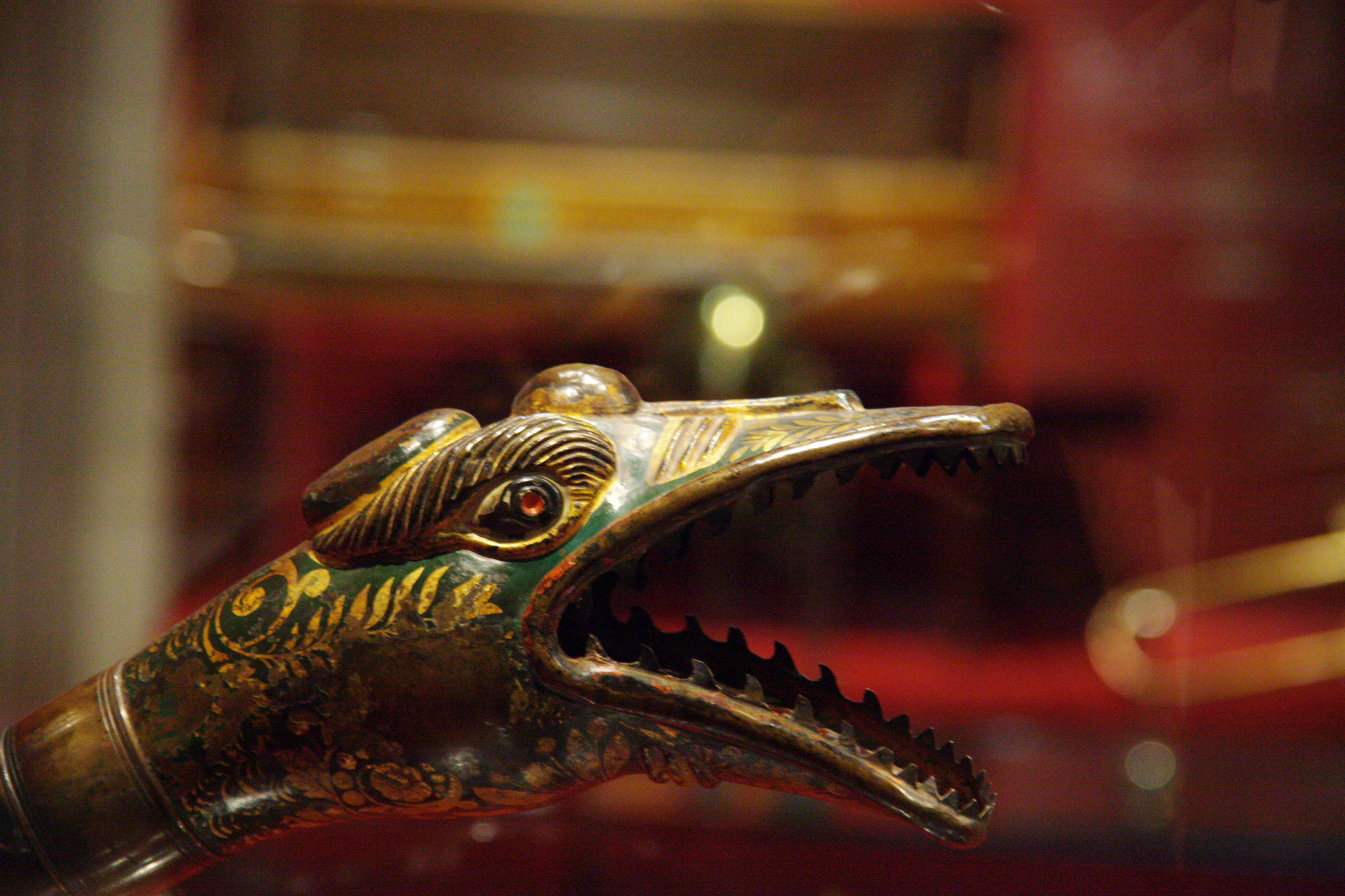 Buccèn. Espanya; França. 1800 - 1860. (MDMB 369). Instruments al Museu de la Música de Barcelona. Fotografies fetes durant el Backstage pass, el 21-11-2013 References MDMB 369 : buccèn (1800-1860). Museu de la Música, El web de la ciutat de Barcelona.